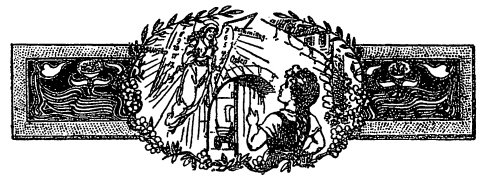 Erzgebirgische Dorfgeschichten